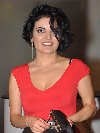 Göksel'in 2016 yılında çekilmiş bir fotoğrafı.